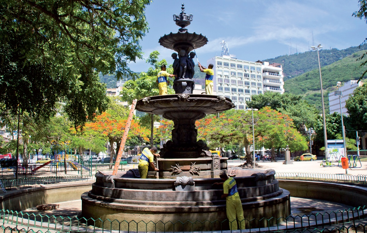 O chafariz da Praça Xavier de Brito passando por manutenção.